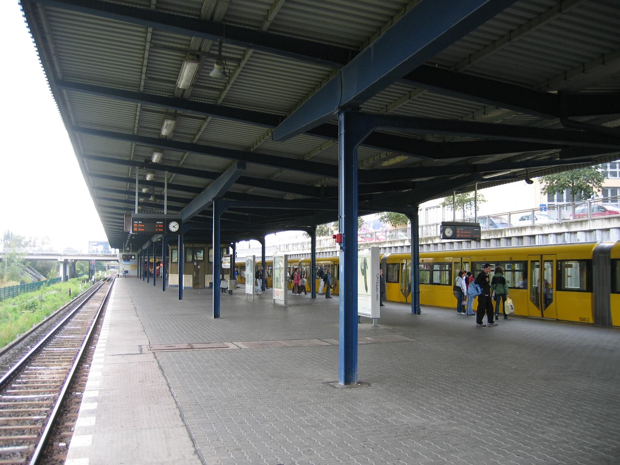 U-Bahnhof Hellersdorf, Berlin